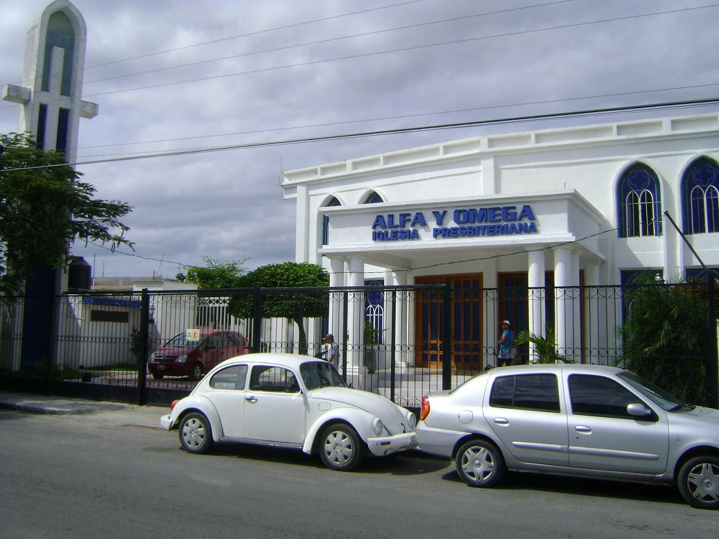 Iglesia Nacional Presbiteriana de México Alfa y Omega Calle 20 entre 1 y 3 sur, 77710 Playa del Carmen, Mexico.